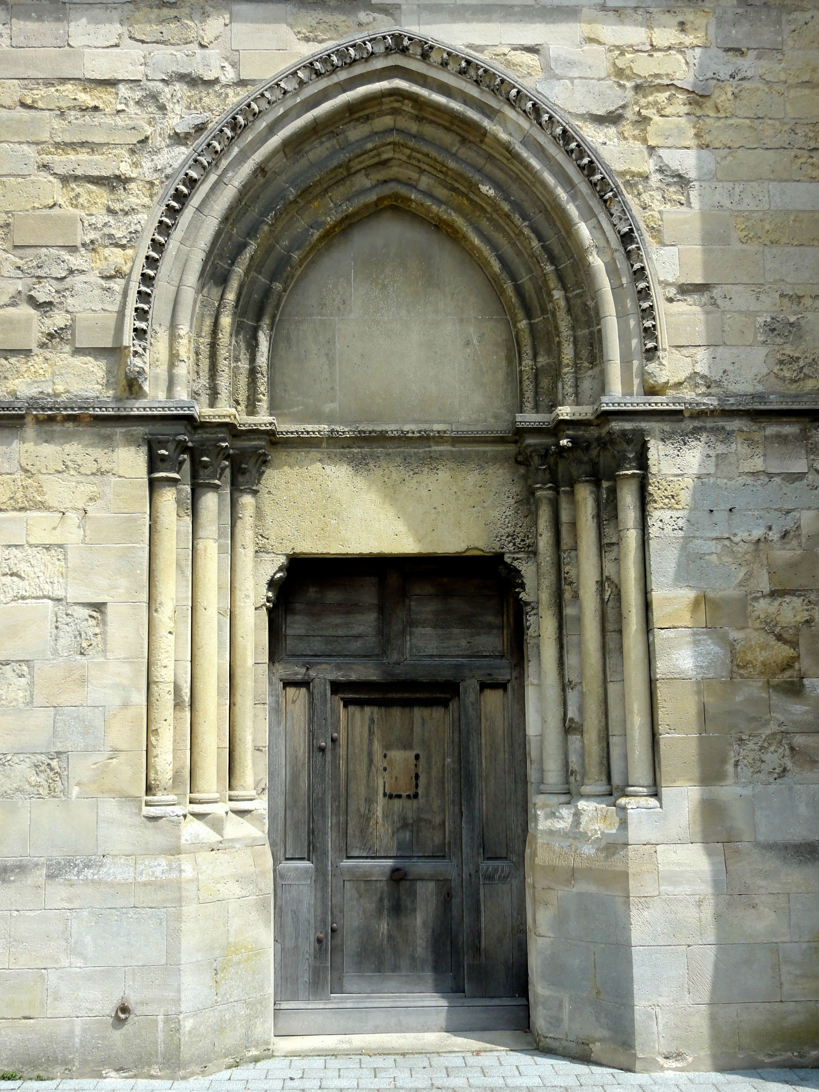 Portail occidental.